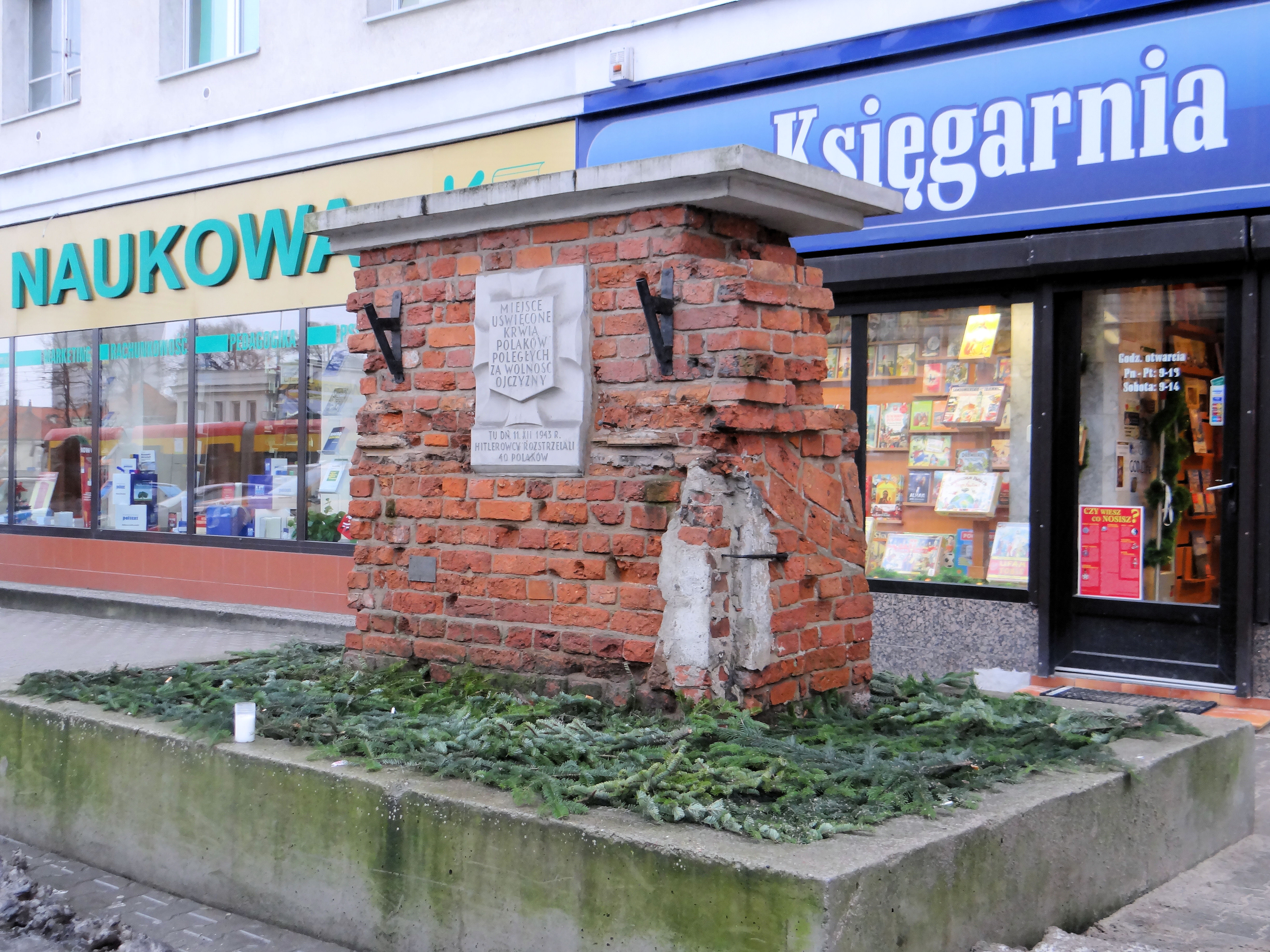 Miejsce pamięci: 11 grudnia 1943 r hitlerowcy rozstrzelali w tej okolicy 40 Polaków